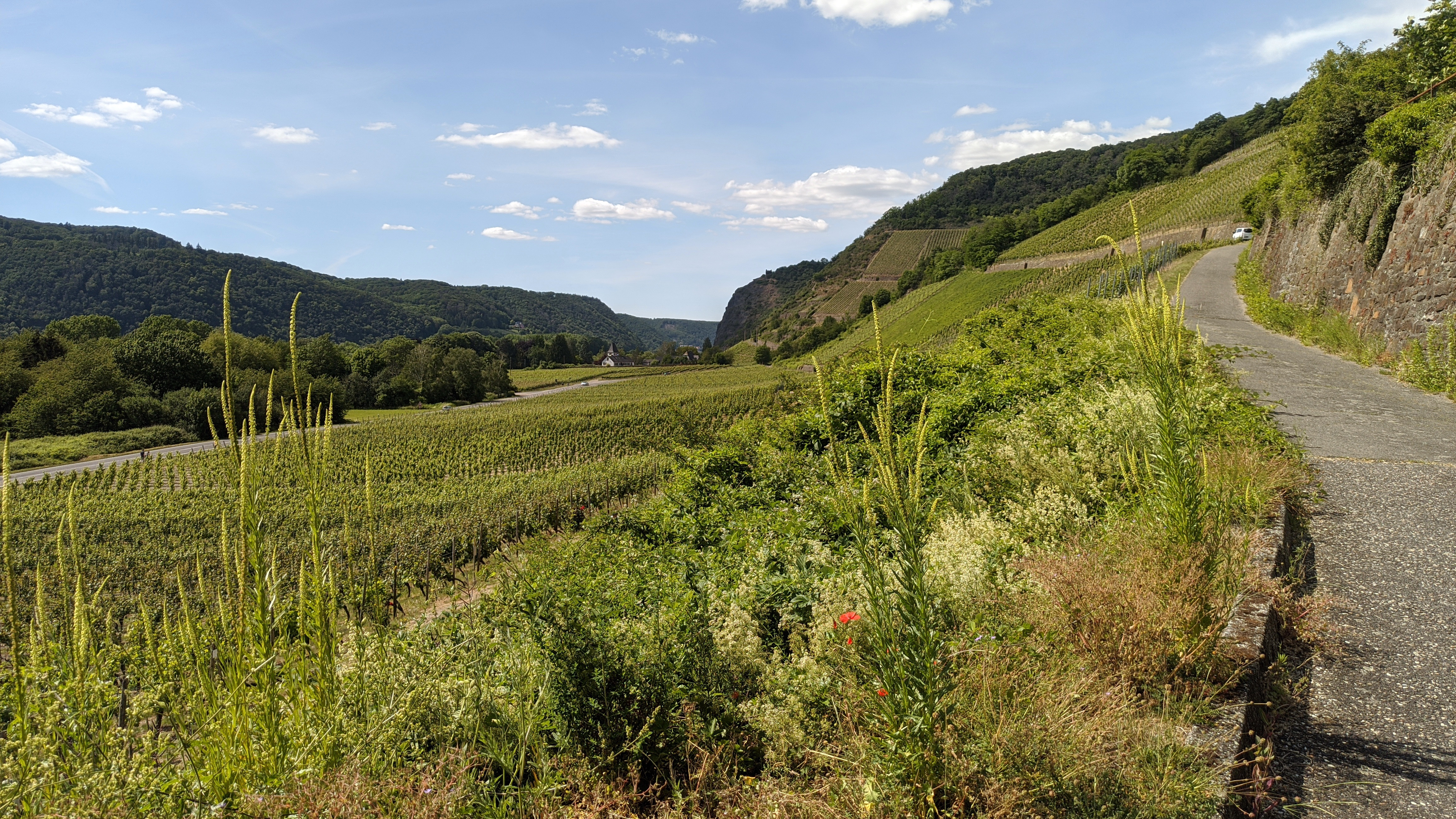 Chemin de randonné dans les vignes de Leutesdorf